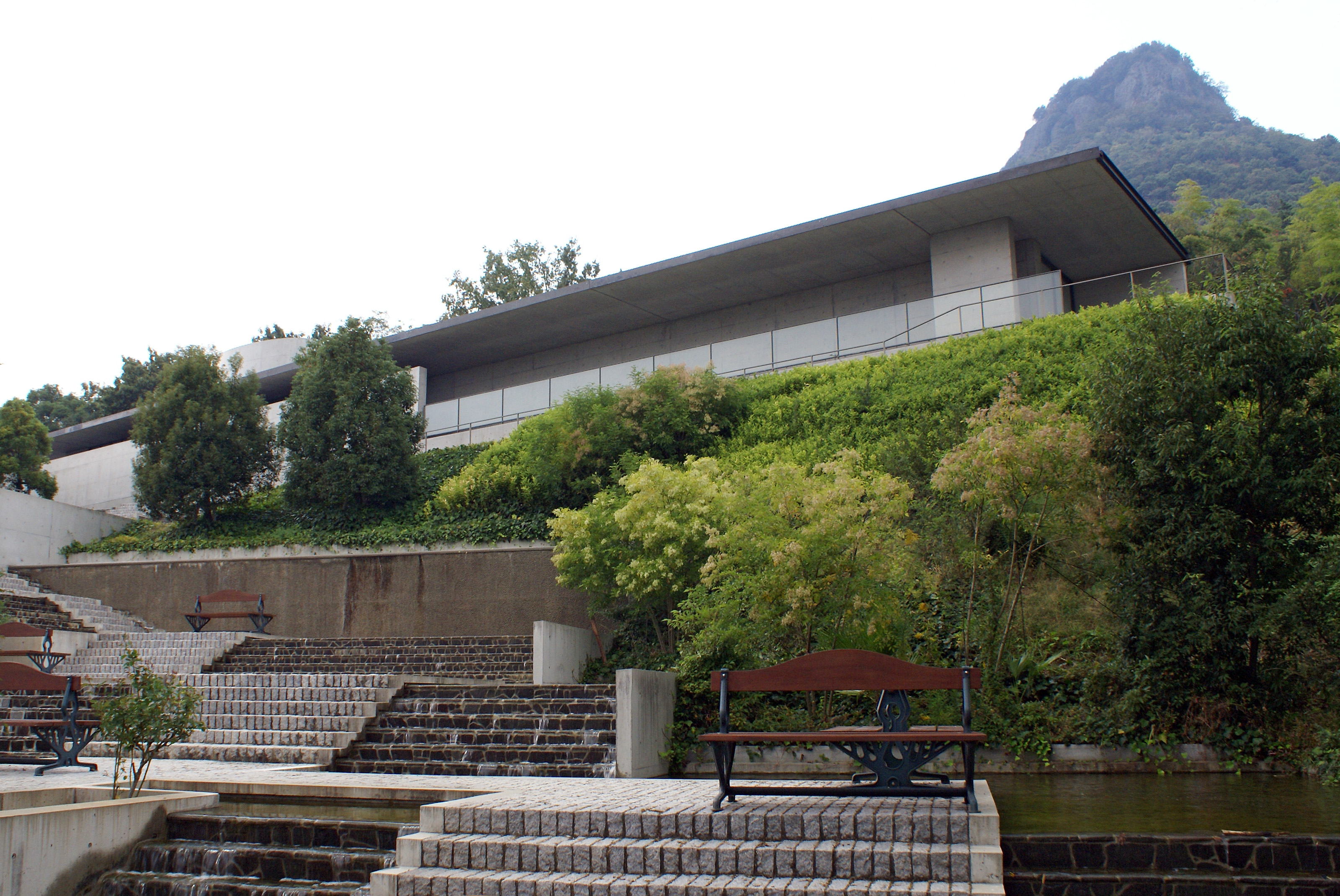 Shikokumura Gallery in Shikokumura, Takamatsu, Kagawa Prefecture, Japan